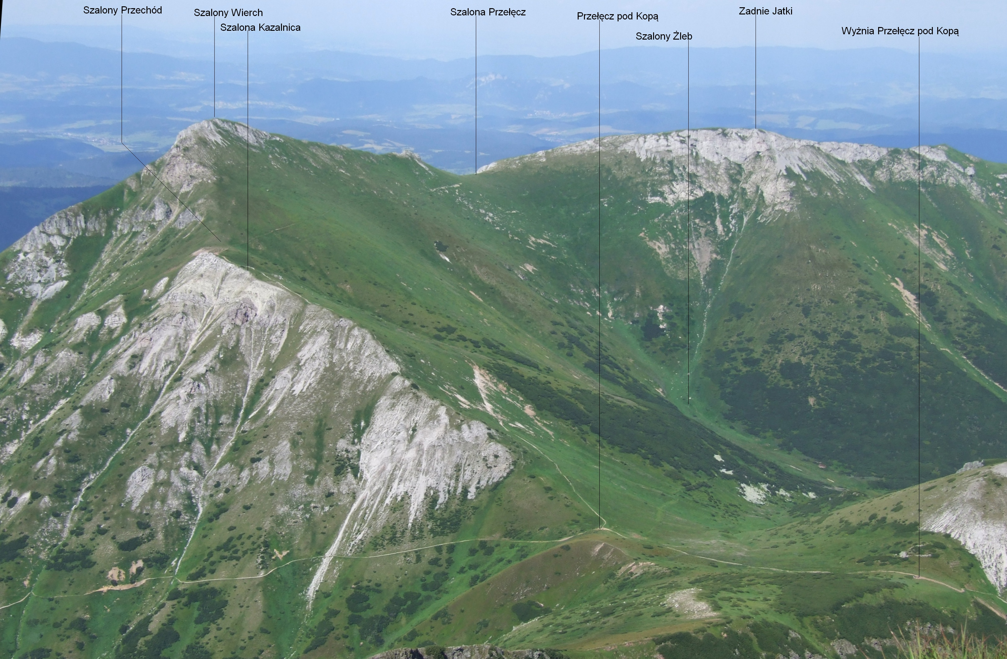 Tatry Bielskie. Widok z Jagnięcego Szczytu